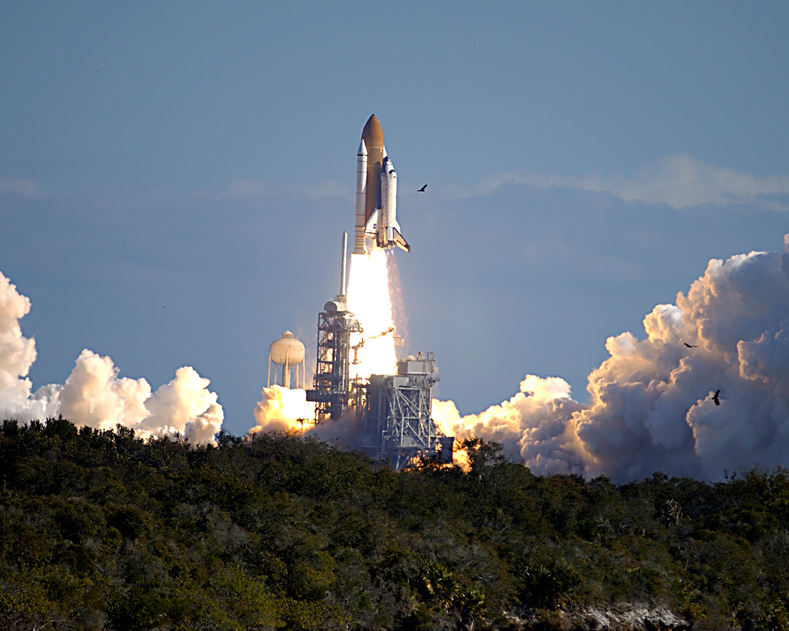 哥倫比亞號太空梭最後一次發射升空 哥倫比亞號太空梭是美國國家航空暨太空總署（NASA）的太空梭機隊中第一架加入執行任務的太空梭，與第二架在任務中因為意外而損失掉的太空梭。 圖中所見是哥倫比亞號在2003年1月16日東部標準時間10點39分時，自佛羅里達州甘迺迪太空中心的第39A發射台上點火升空時的雄姿。可惜的是哥倫比亞號在執行完代號STS-107的這趟16天任務之後，在2月1日重返大氣層時，於德州上空解體墜毀，而使得這次發射成為哥倫比亞號的絕響。 本圖片下載於NASA太空飛行官方網站，根據美國政府政策，由政府單位攝製的媒體皆屬公共領域範圍而可合法使用。